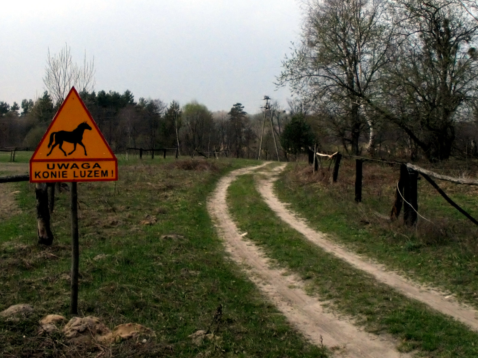 Polanka Horyniecka (Polska) - stadnina koni